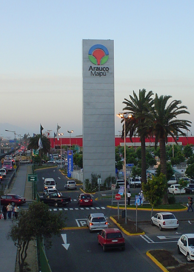 Mall Arauco Maipú